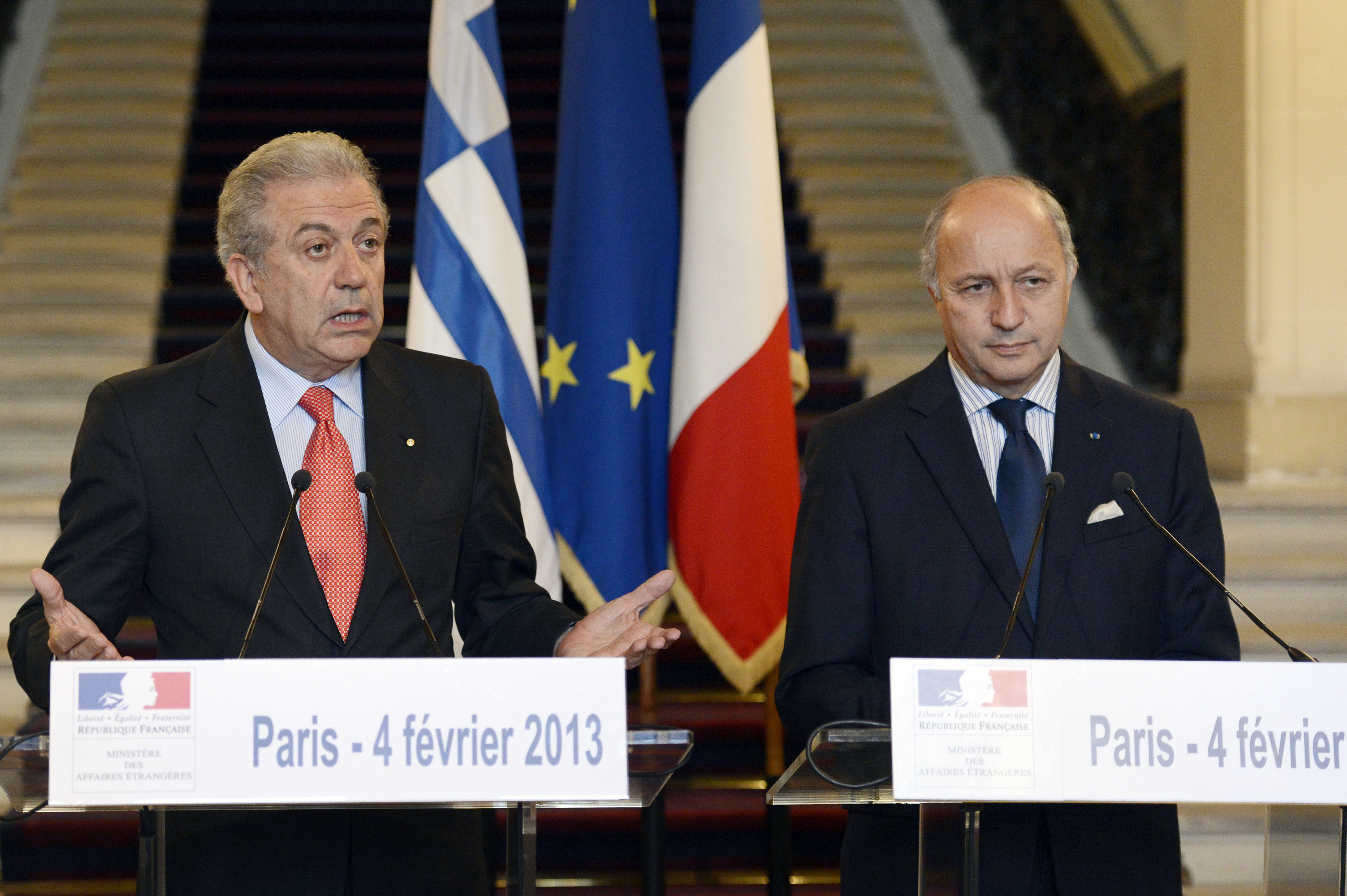 Τη Δευτέρα 4 Φεβρουαρίου 2013, ο Υπουργός Εξωτερικών Δημήτρης Αβραμόπουλος συναντήθηκε με τον Γάλλο Υπουργό Εξωτερικών Laurent Fabius στα πλαίσια επίσημης επίσκεψής του στη Γαλλία Πηγή: Agence France-Presse